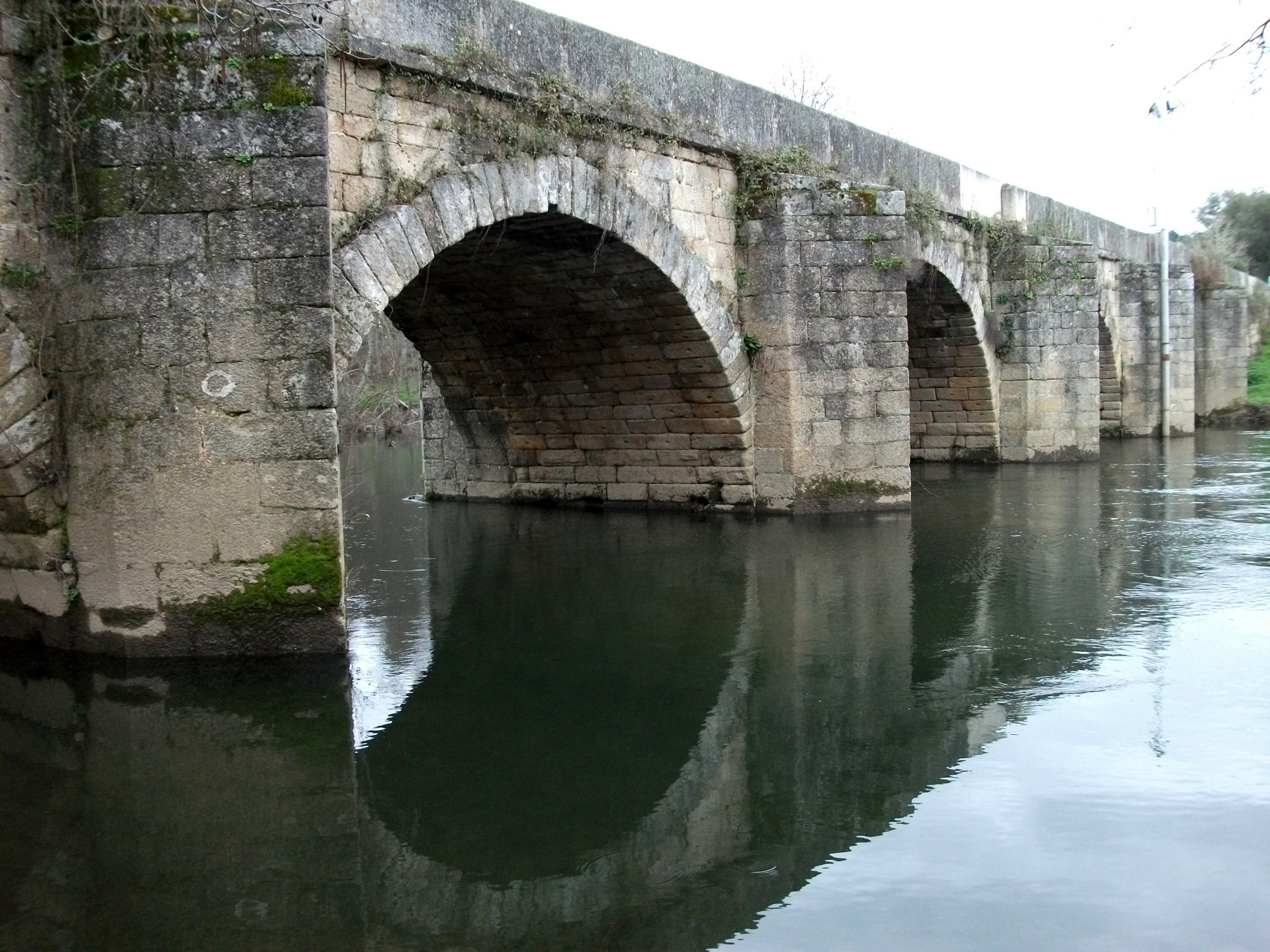 Vista a jusante da margem direita da "Ponte de pedra sobre o rio Tuela", também referida como "Ponte Românica sobre o rio Tuela" ou "Ponte de Torre de Dona Chama", na Estrada Nacional 206 em Torre de Dona Chama, Portugal.